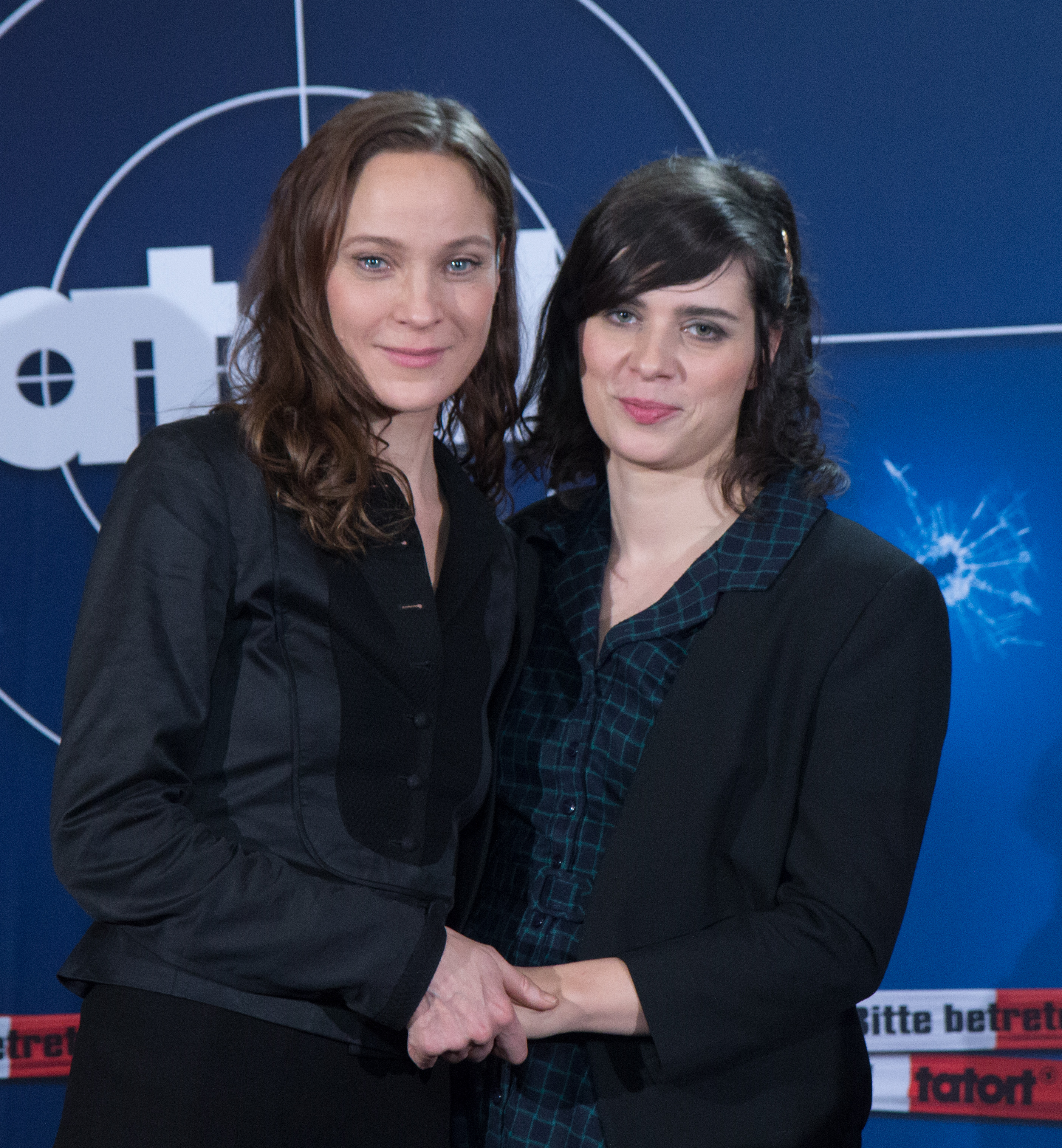 Fotocall im Rahmen der Preview des Tatorts „Der wüste Gobi“ u.a. mit Nora Tschirner.